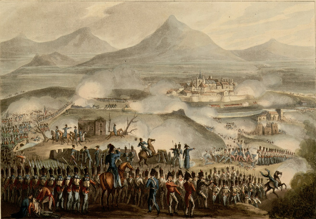 Fait partie d'un volume de gravures sur cuivre par T. Sutherland et D. Havell réhaussées à l'aquarelle. Titre gravé illustré en n. et b. Chaque gravure est suivie d'un texte explicatif. + in fine : "Contents", and "Names of Subscribers to the Martial Achievements of Great Britain and her allies". Ancely, René (1876 - 1966). Possesseur